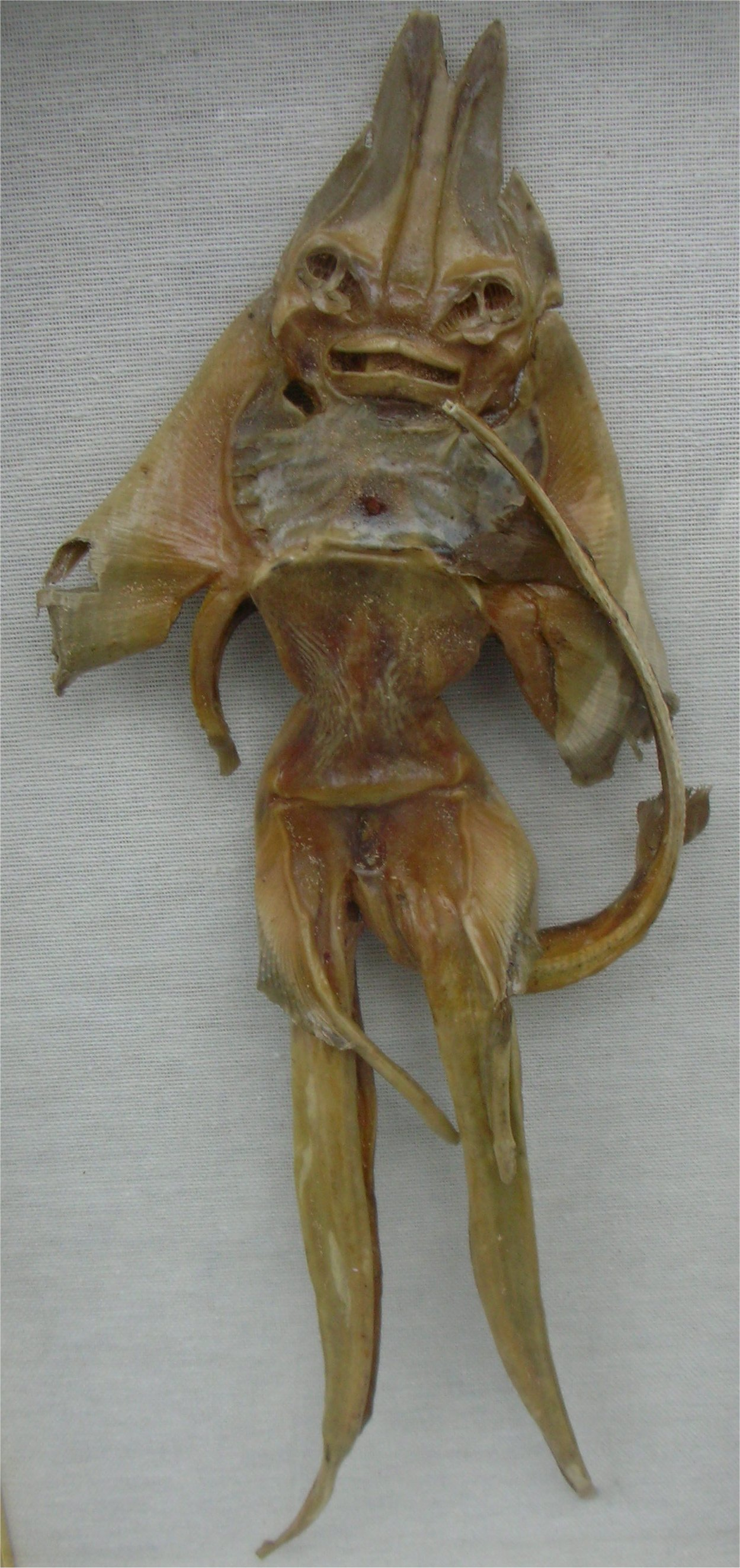 Jenny Haniver, Devil fish